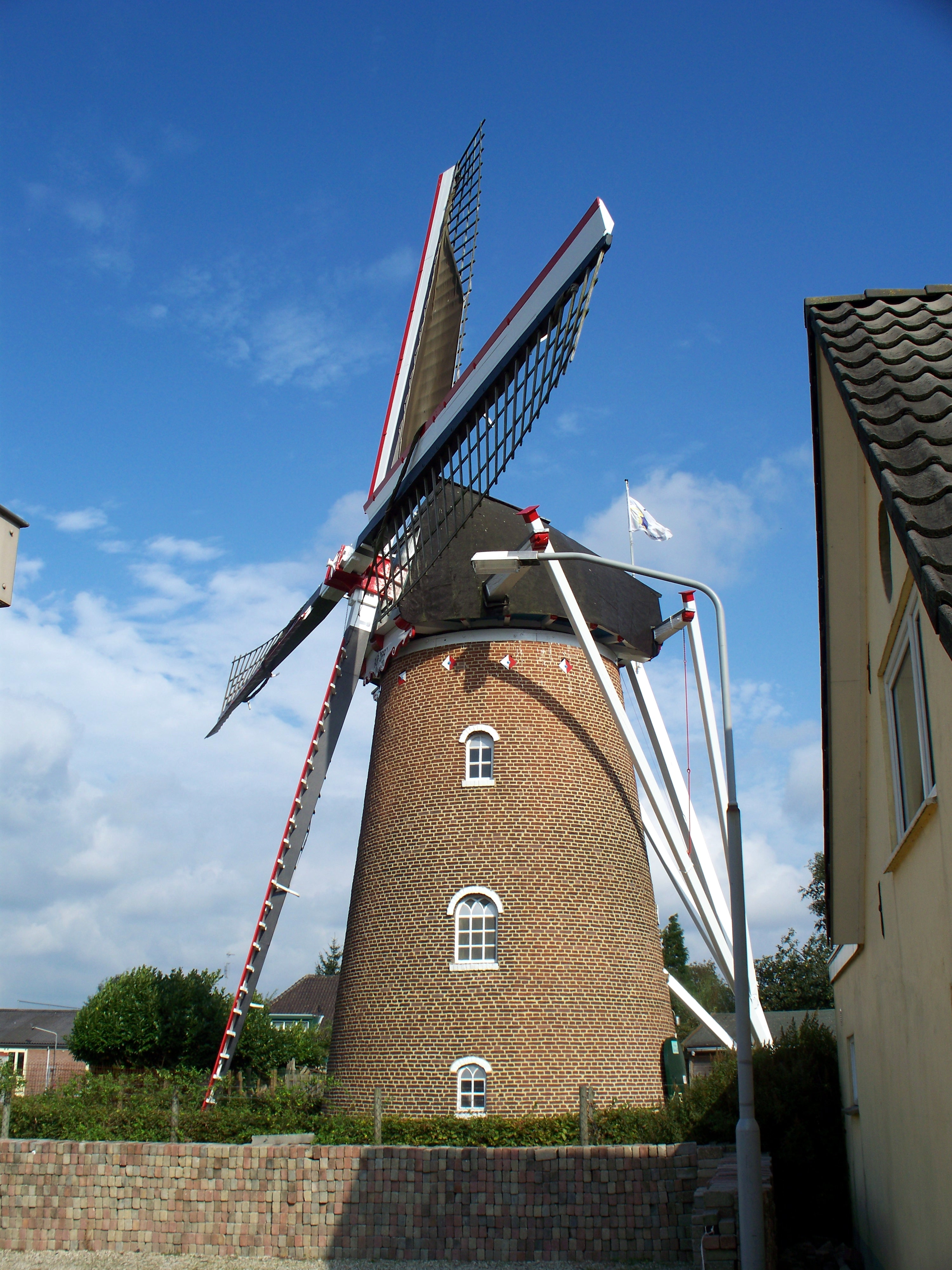 Molen Aurora te Dichteren (Doetinchem), Wehlseweg